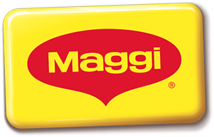 Logo de la marque d'aides culinaires Maggi.